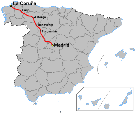 Mapa de la carretera N6